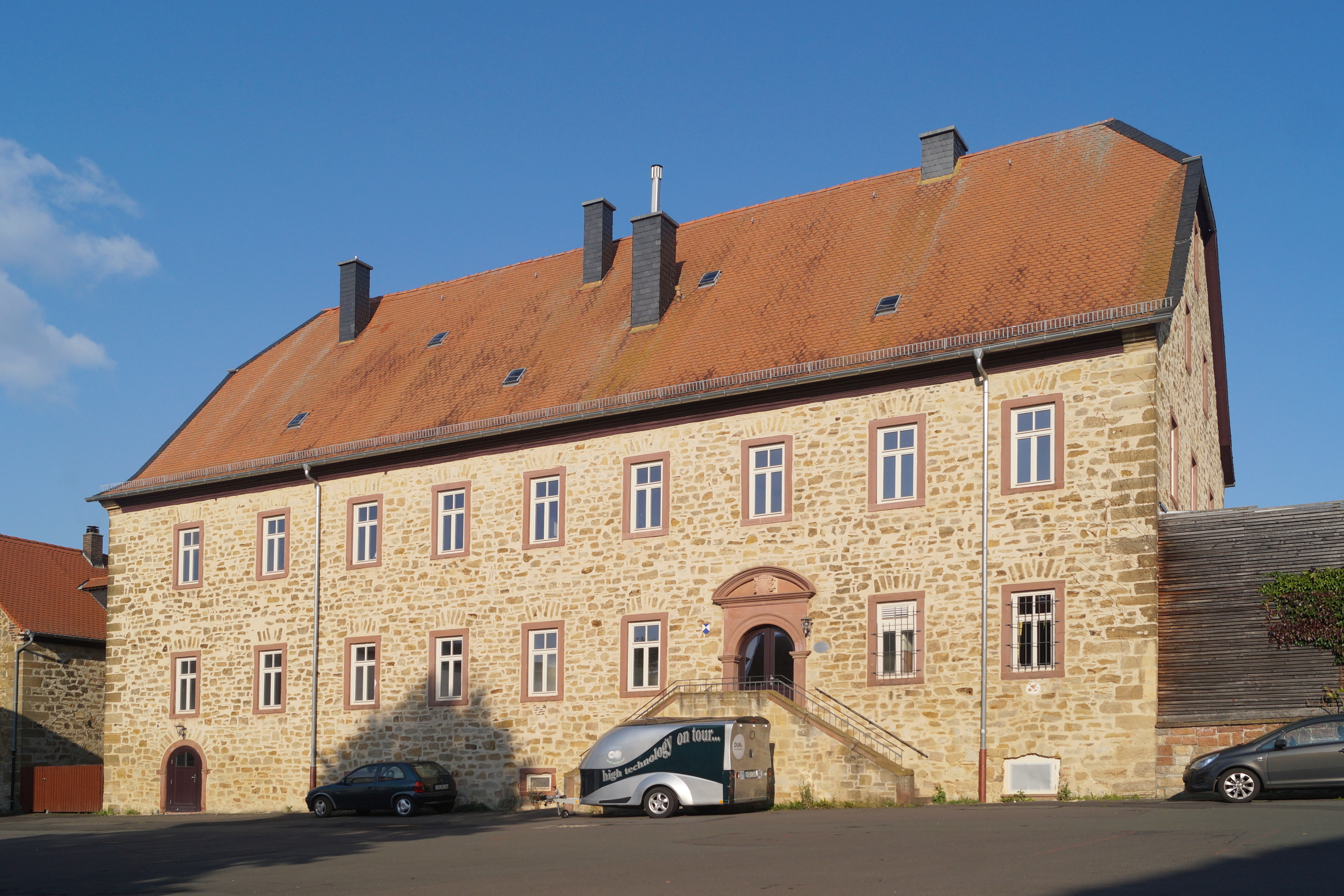 Sogenannter "Pfaffenhof" im Ortskern von Nidderau-Erbstadt. Wohnhaus des ehemaligen Klosterguts der Praemonstratenser aus Ilbenstadt.